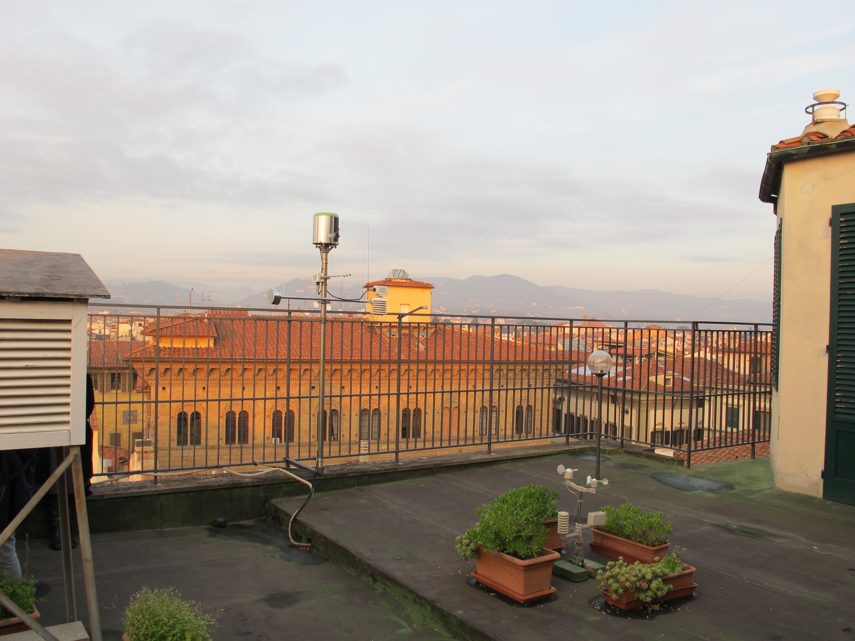 Osservatorio ximeniano, stazione metereologica